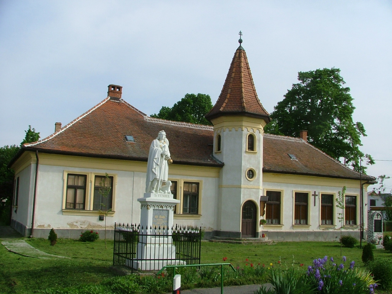 Chernelházadamonya - Kirche